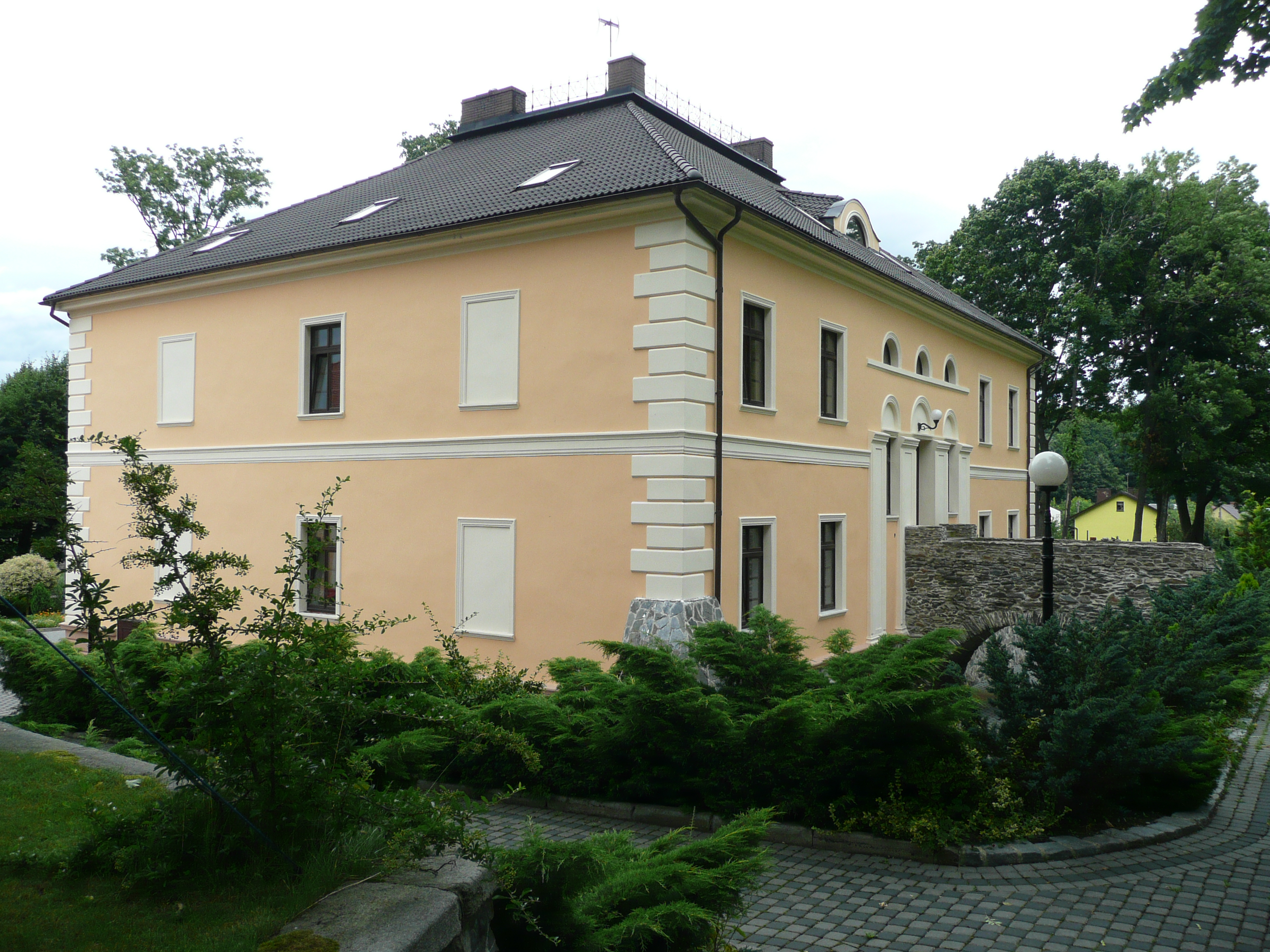 Jarnołtówek - Zameczek - prywatny posiadacz tak zadbał o zdewastowany dawniej obiekt.